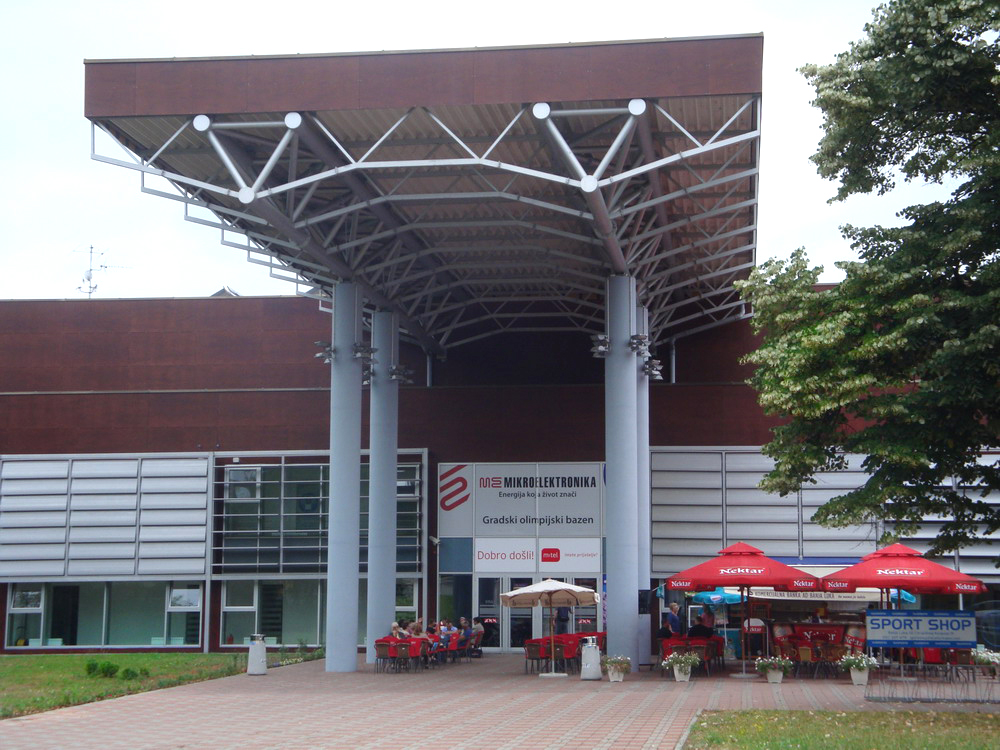 Градски_олимпијски_базен_у_Бањалуци